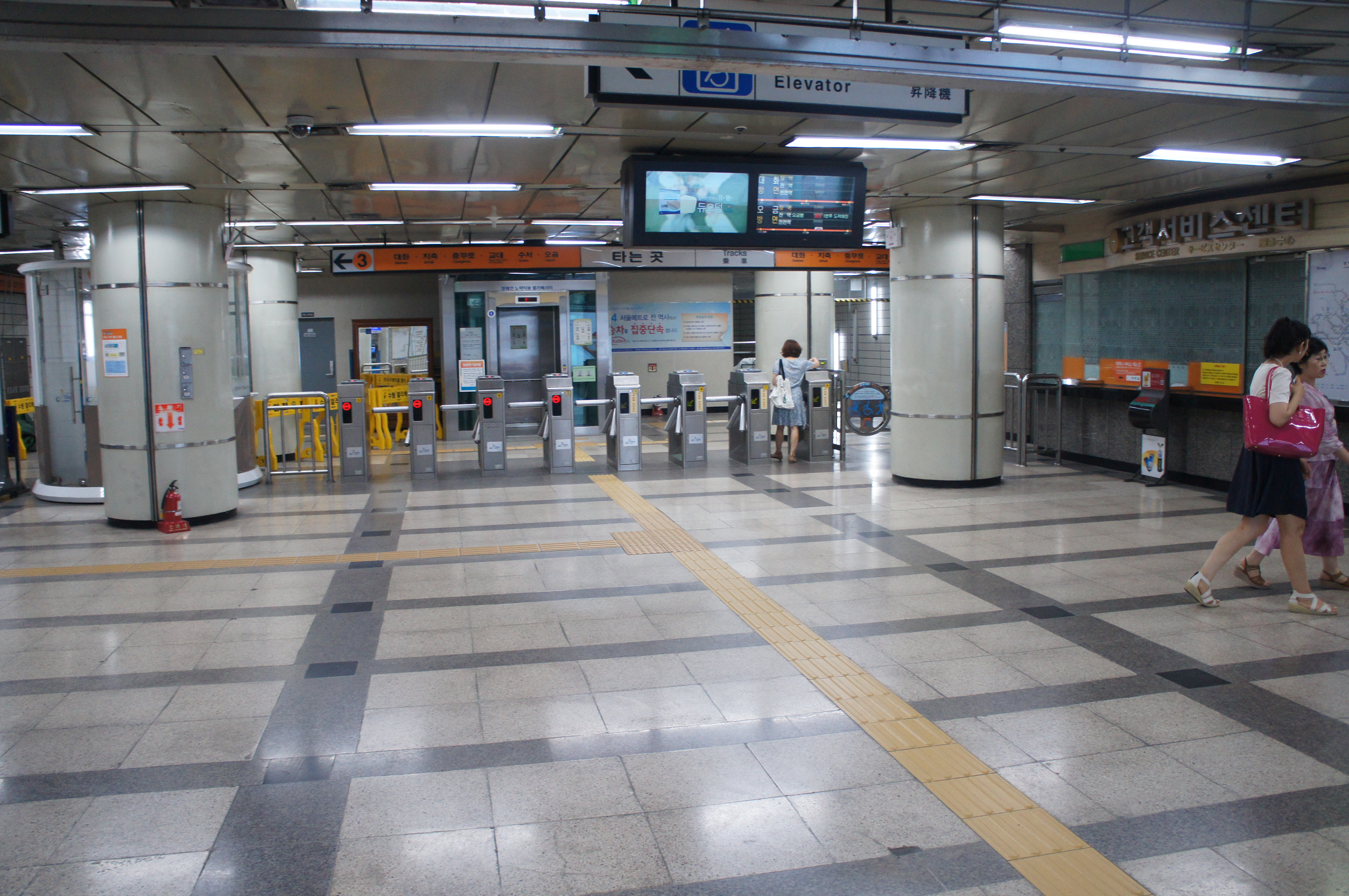 대치역 대합실